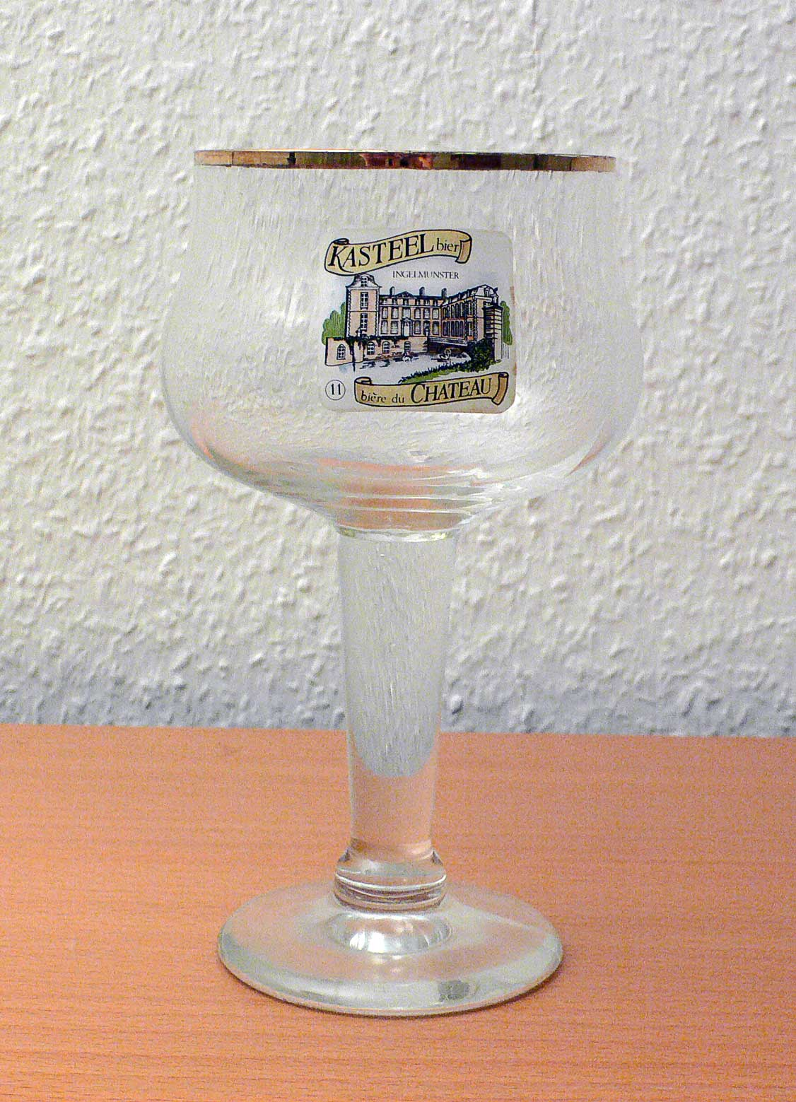 Belgisches Bierglas der Marke Kasteel